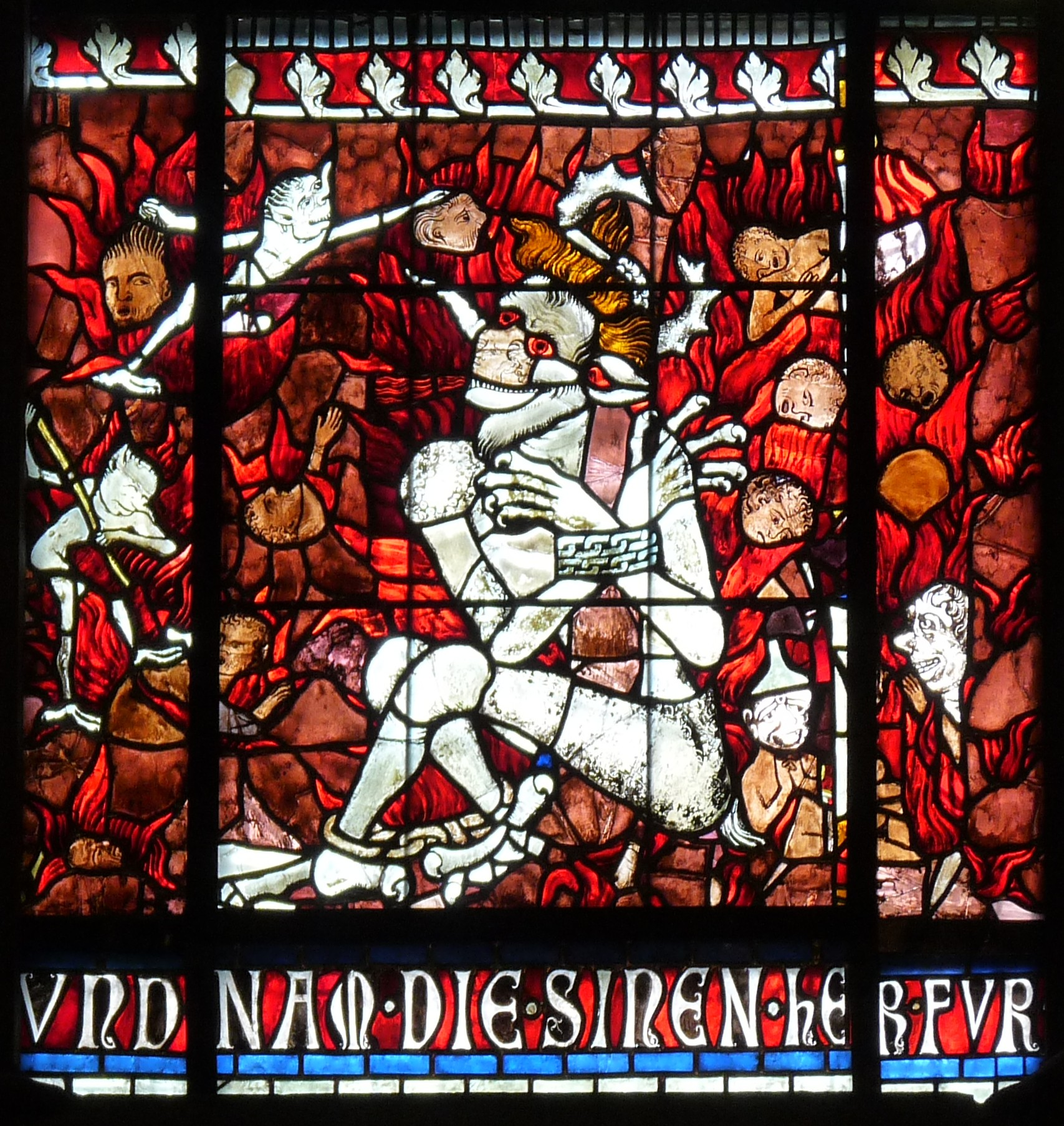 Strasbourg - Cathedrale - Vitrail - Demon (Vitrail 4, Bas-côté sud)